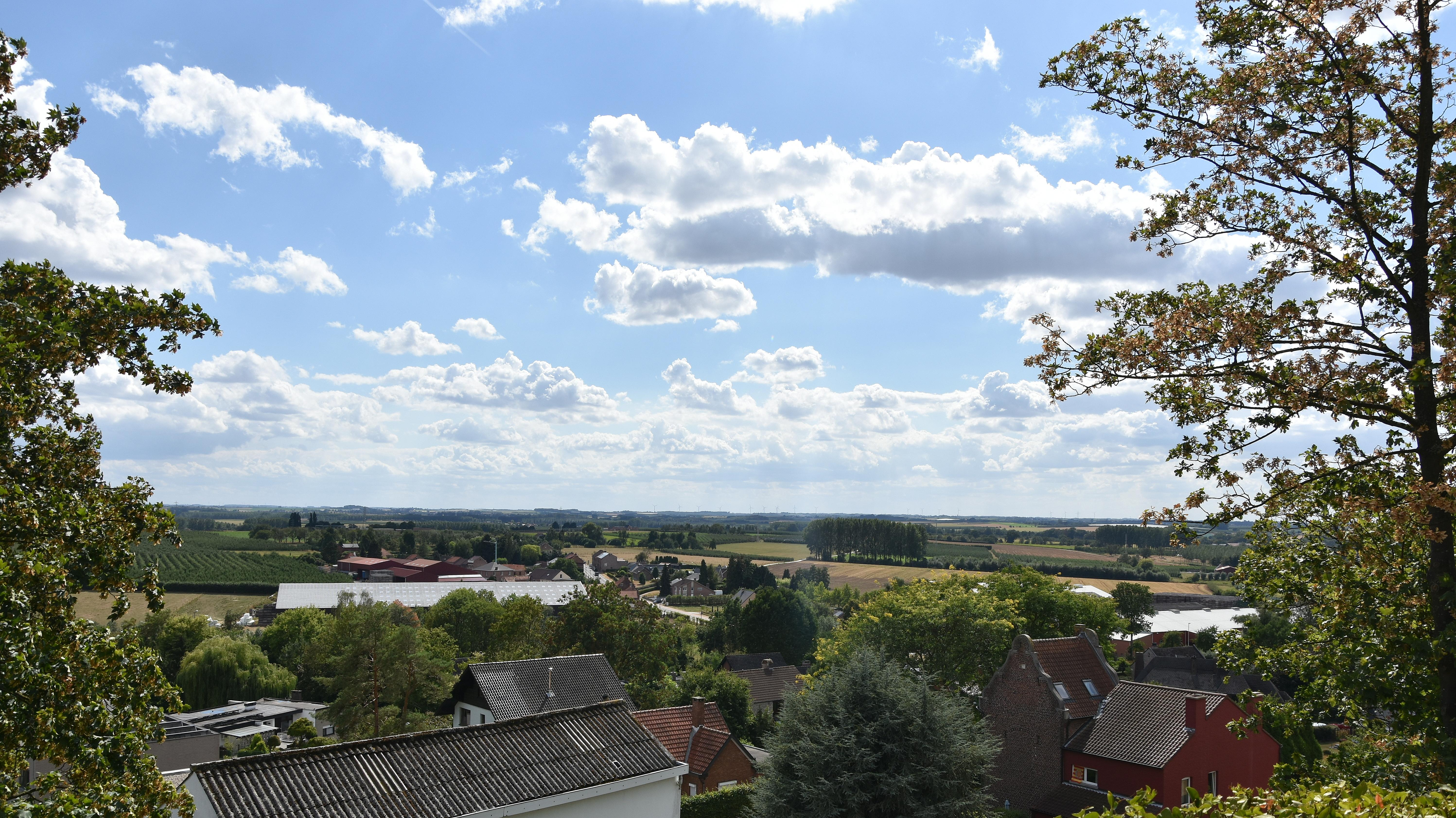 Borgloon 10-08-2018 This photo of immovable heritage has been taken in the Flemish Region